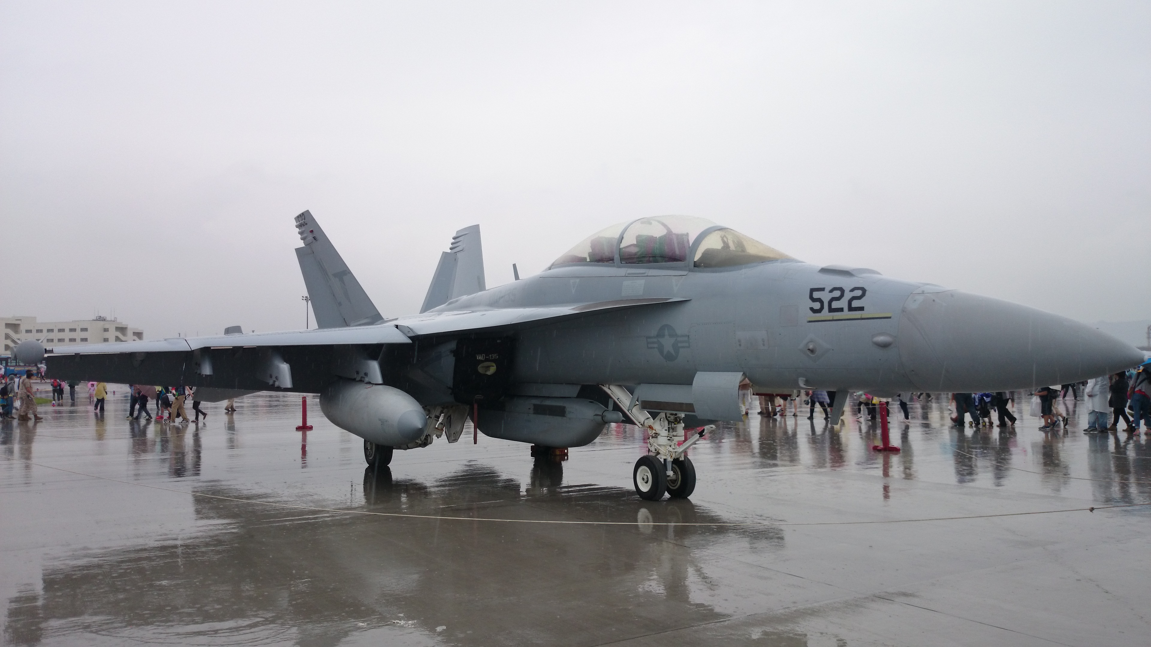 米海軍 EA-18G電子戦機（No.166942、VAQ-135電子戦飛行隊所属）。 2015年5月3日 米海兵隊岩国航空基地にて。